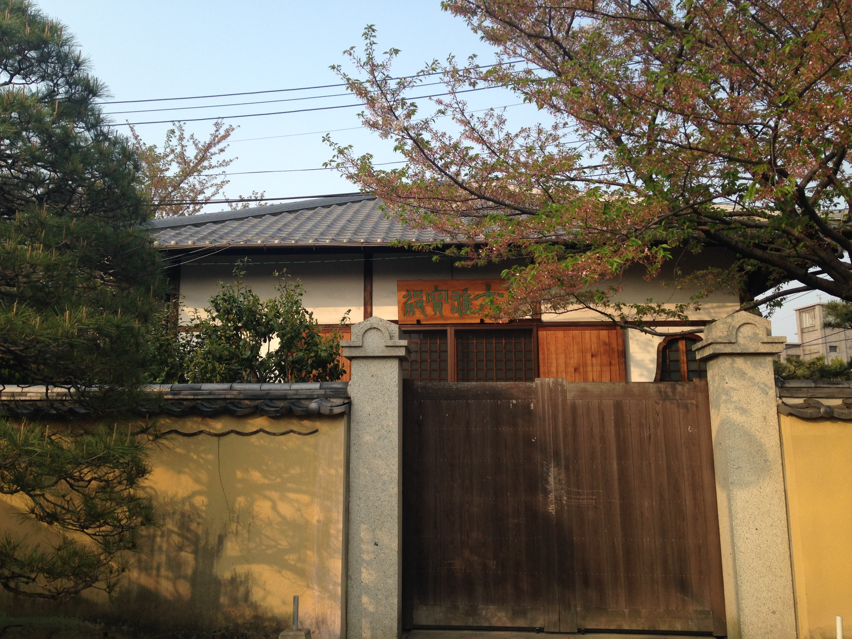 崇福寺・大雄宝殿(本堂)